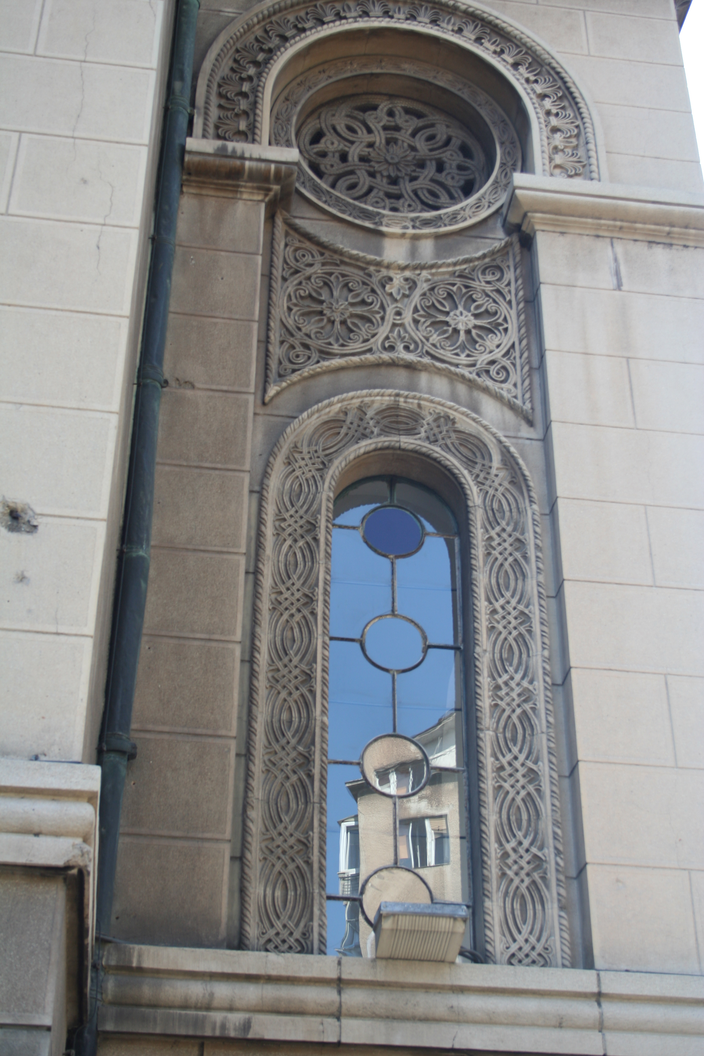 Crkva Sv. Aleksandra Nevskog u Beogradu